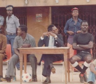 Mory Sinkoun Kaba